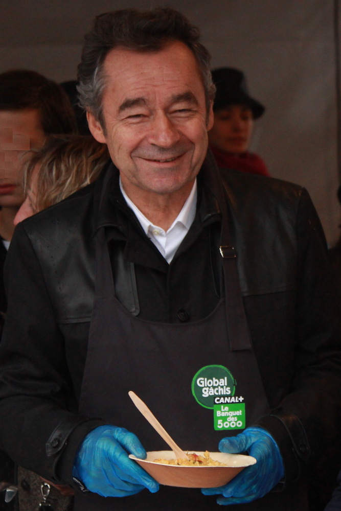 Michel Denisot lors du Banquet des 5000, sur le parvis de l'hôtel de ville de Paris.